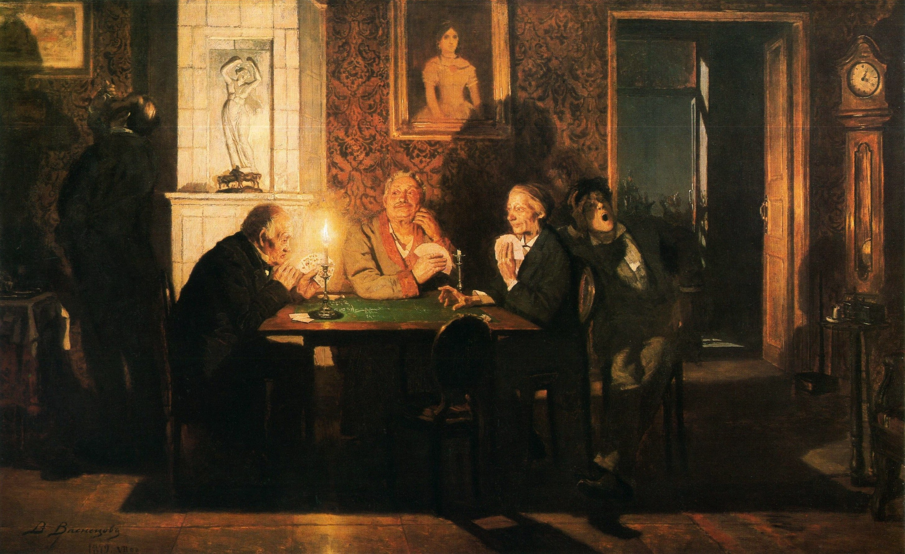 Преферанс